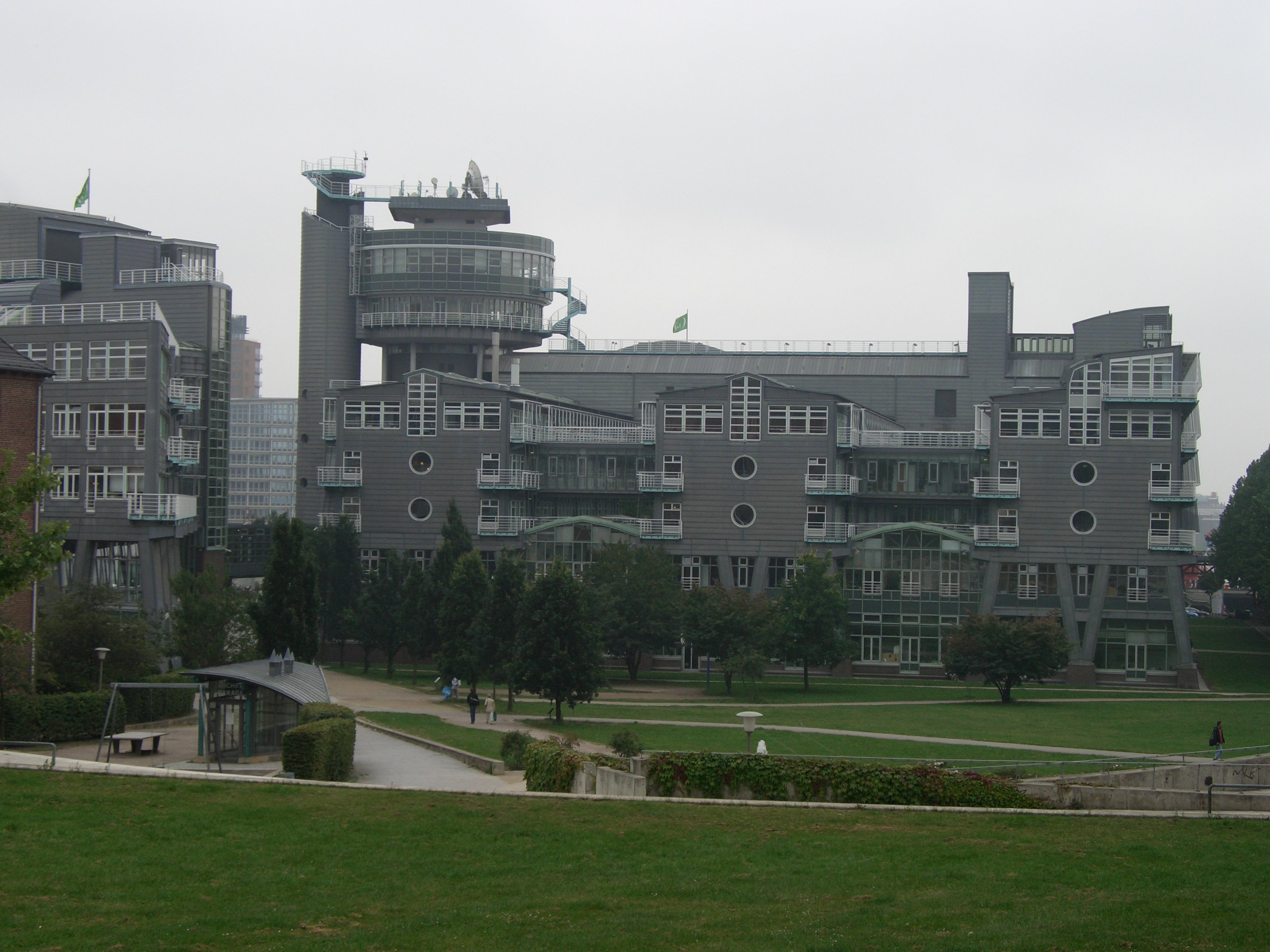 Bildbeschreibung Beschreibung: Verlagshaus Gruner und Jahr am Baumwall von der Michelseite fotografiert. Quelle: Fotografiert am 23.8.2005 Fotograf: Habe ich selbst fotografiert (Benutzer:Bejo) Copyright Status: GNU Freie Dokumentationslizenz